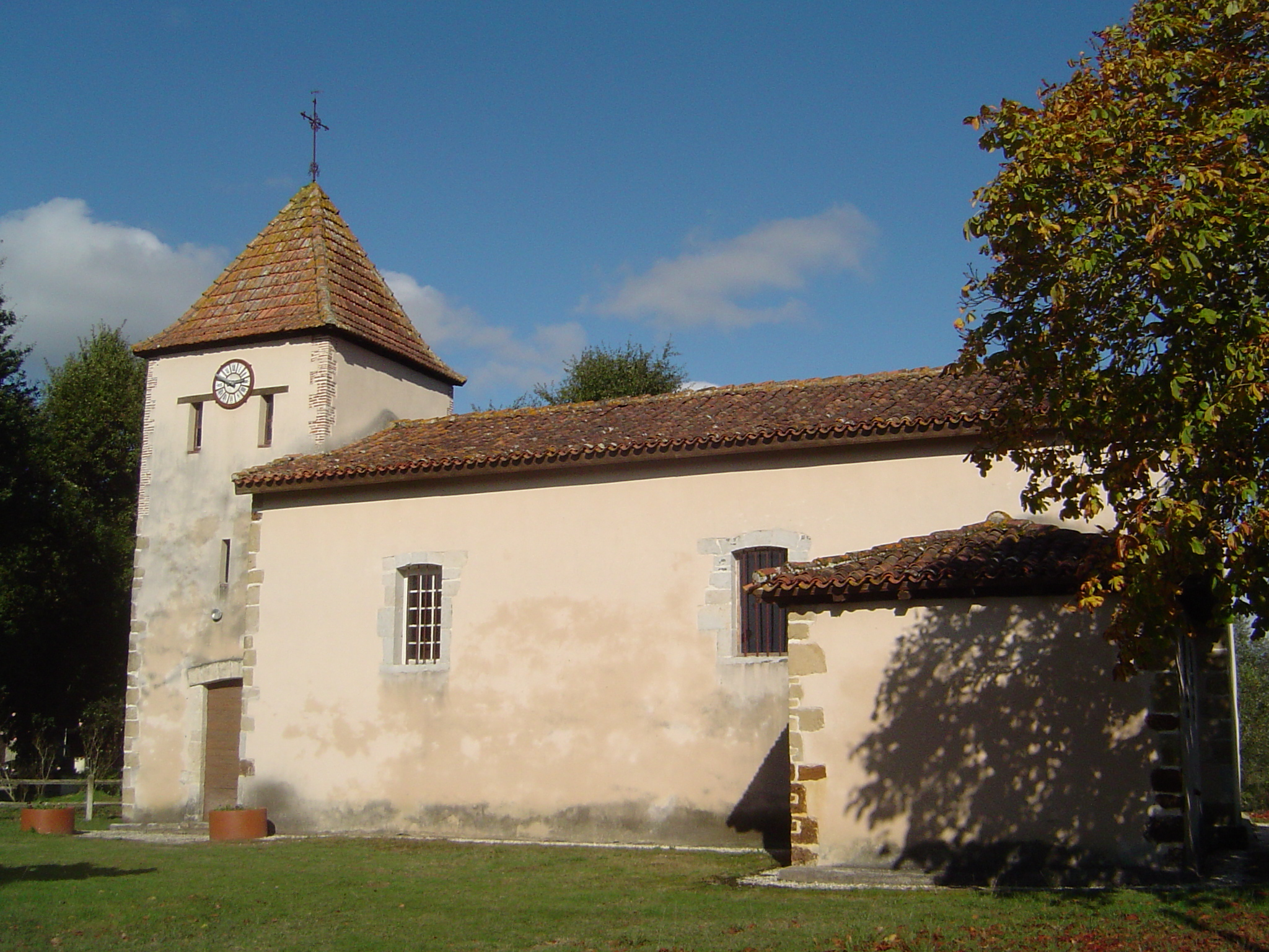 glèisa de St Pè d'Escalús; St Miquèu-Escalús; Gasconha